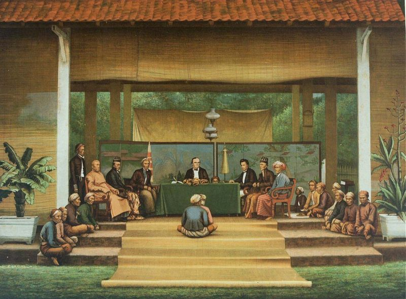 Litho. De litho is naar een foto gemaakt, zie Loos-Haaxman, J. de, Verlaat Rapport Indië, 1968, p. 46. Pagina 21 van de map "De Indische Archipel", Den Haag, 1865-1876 met daarin 24 kleurenlitho's, van objectnr. 3728-430 t/m 3728-479.. De Landraad